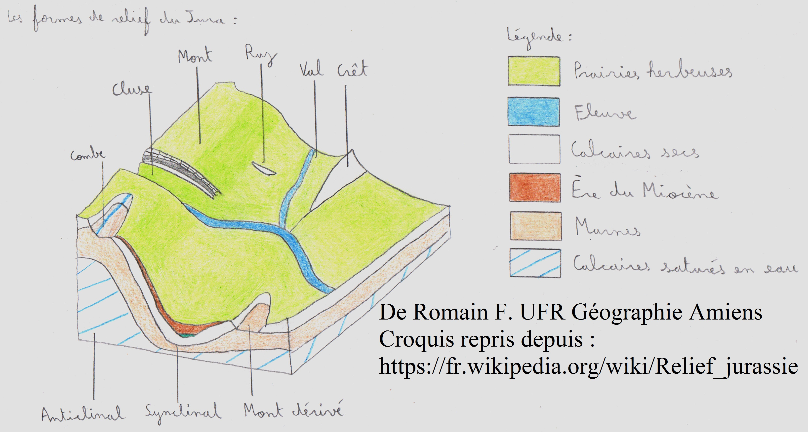 Croquis des différentes formes du relief jurassien, avec légende.